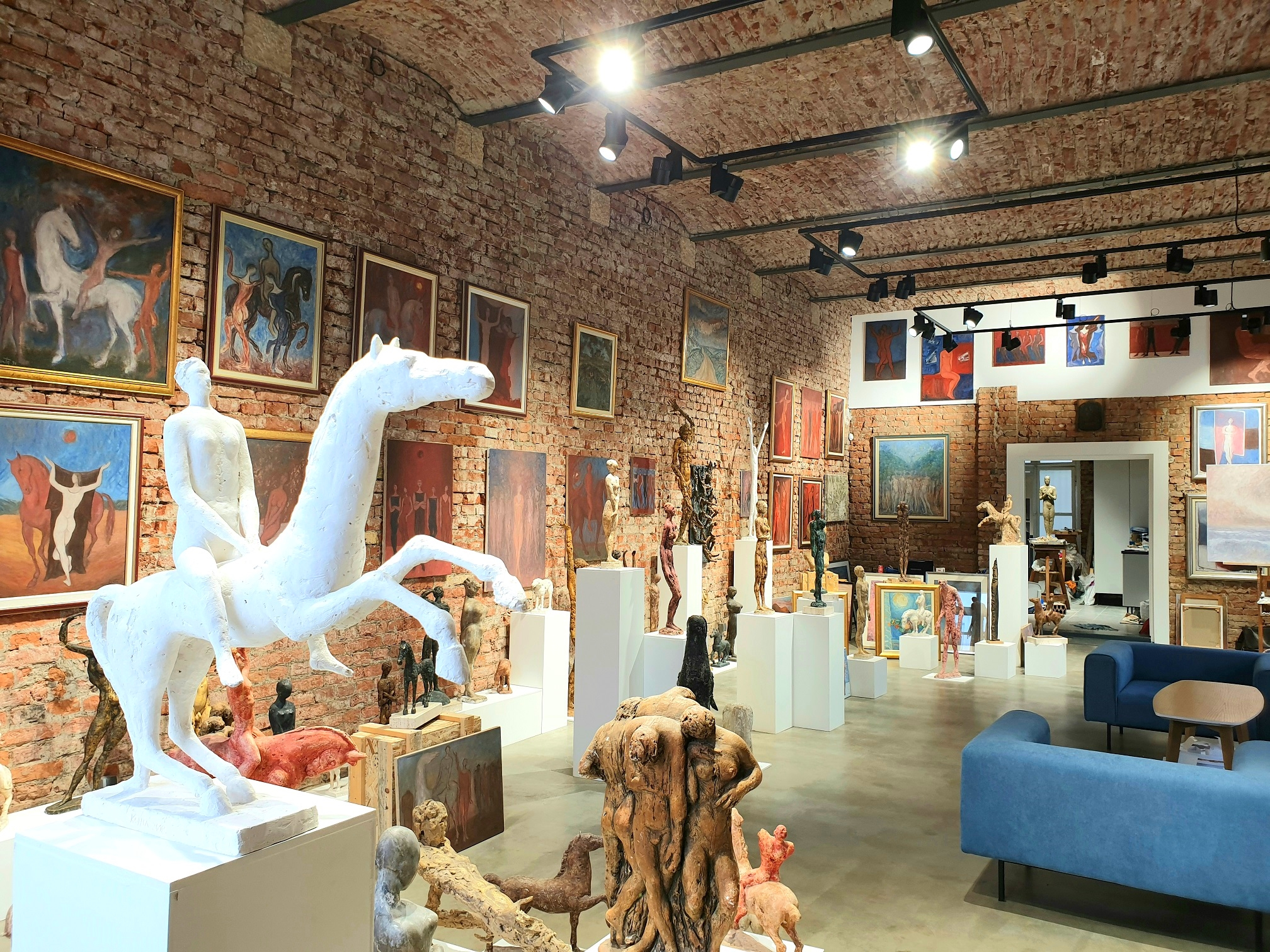 Atelje Josipa Konte